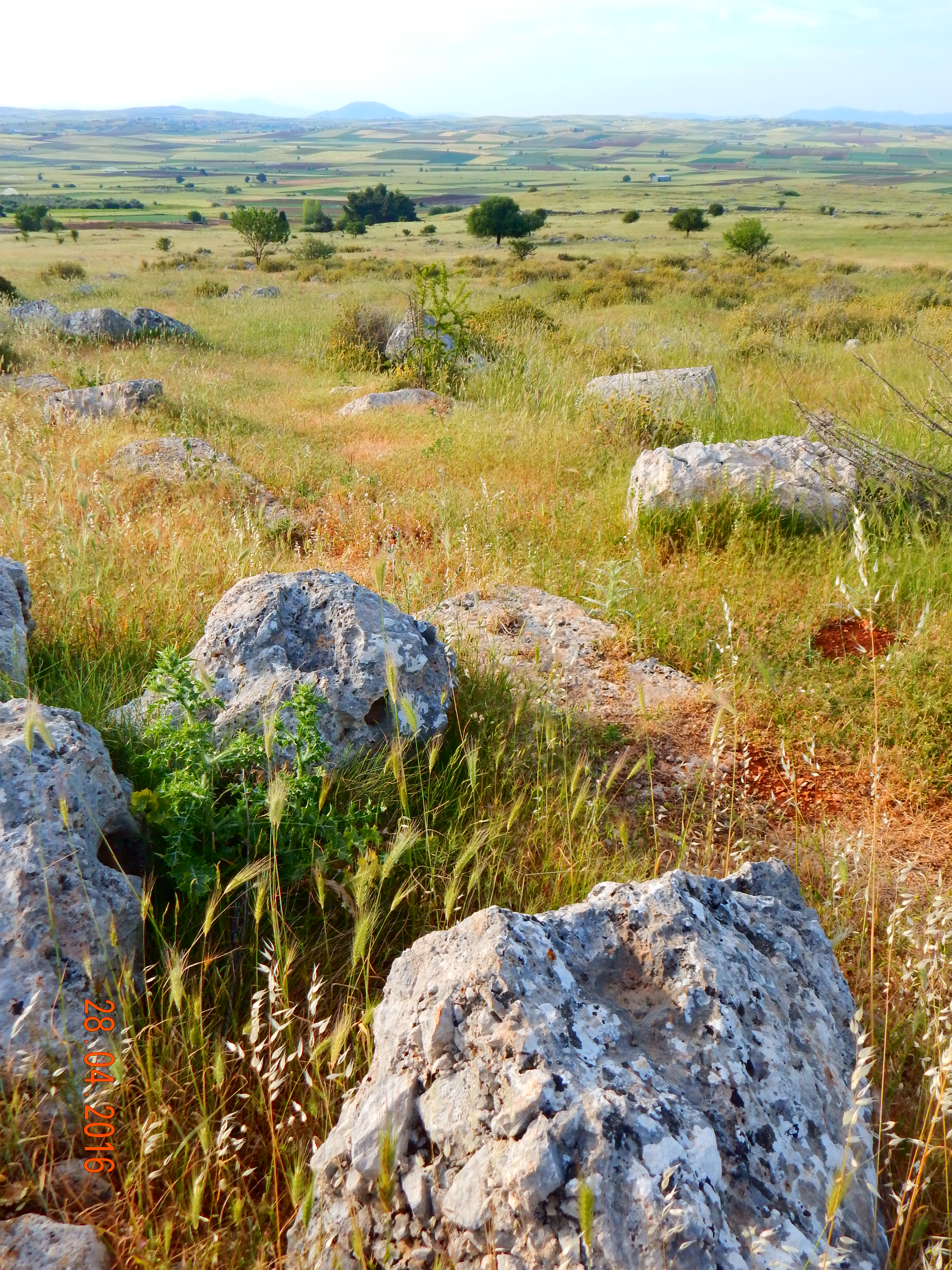 Πλαταιές«Πλαταιές»